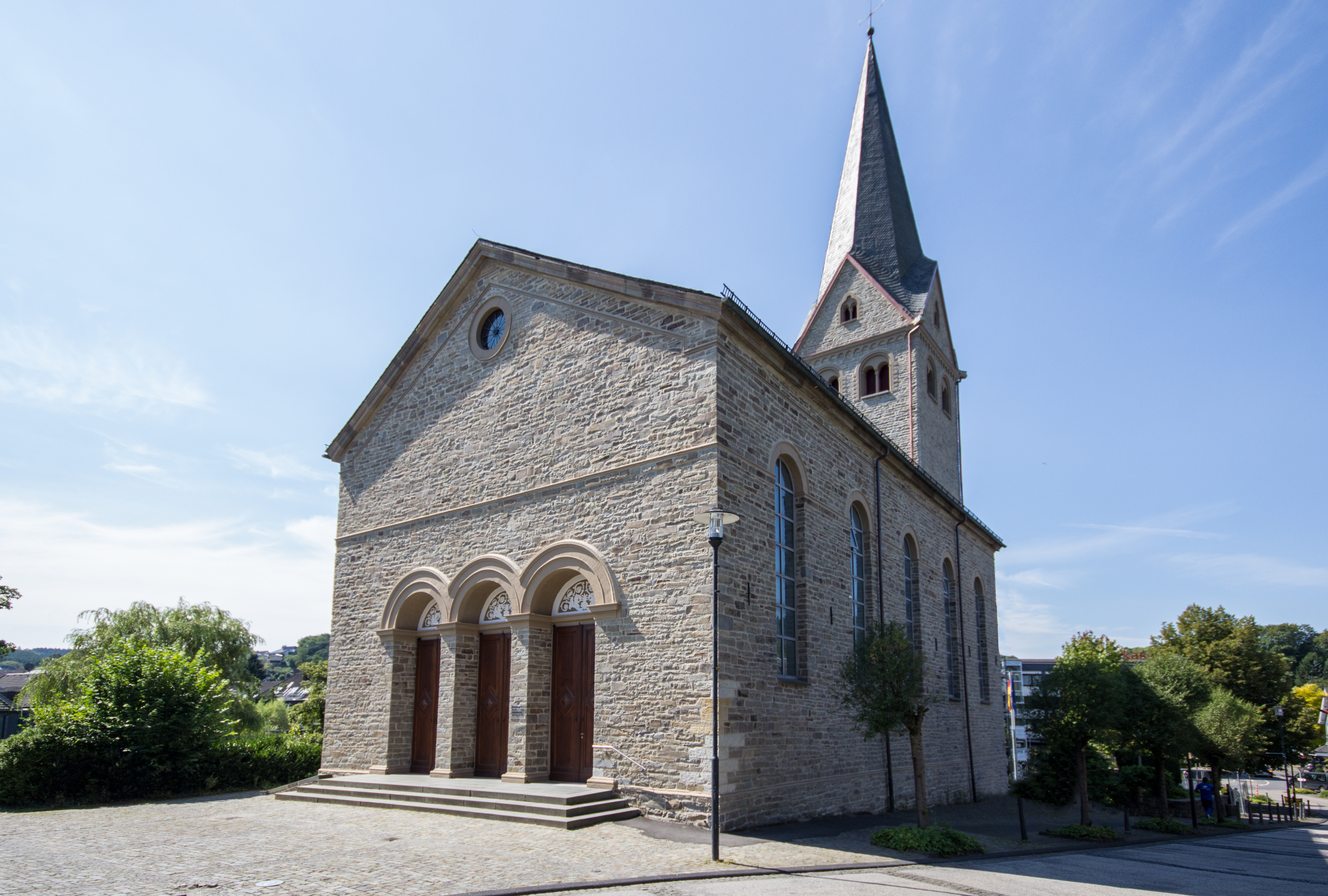 evangelische Kirche in Wiehl nach der Restaurierung